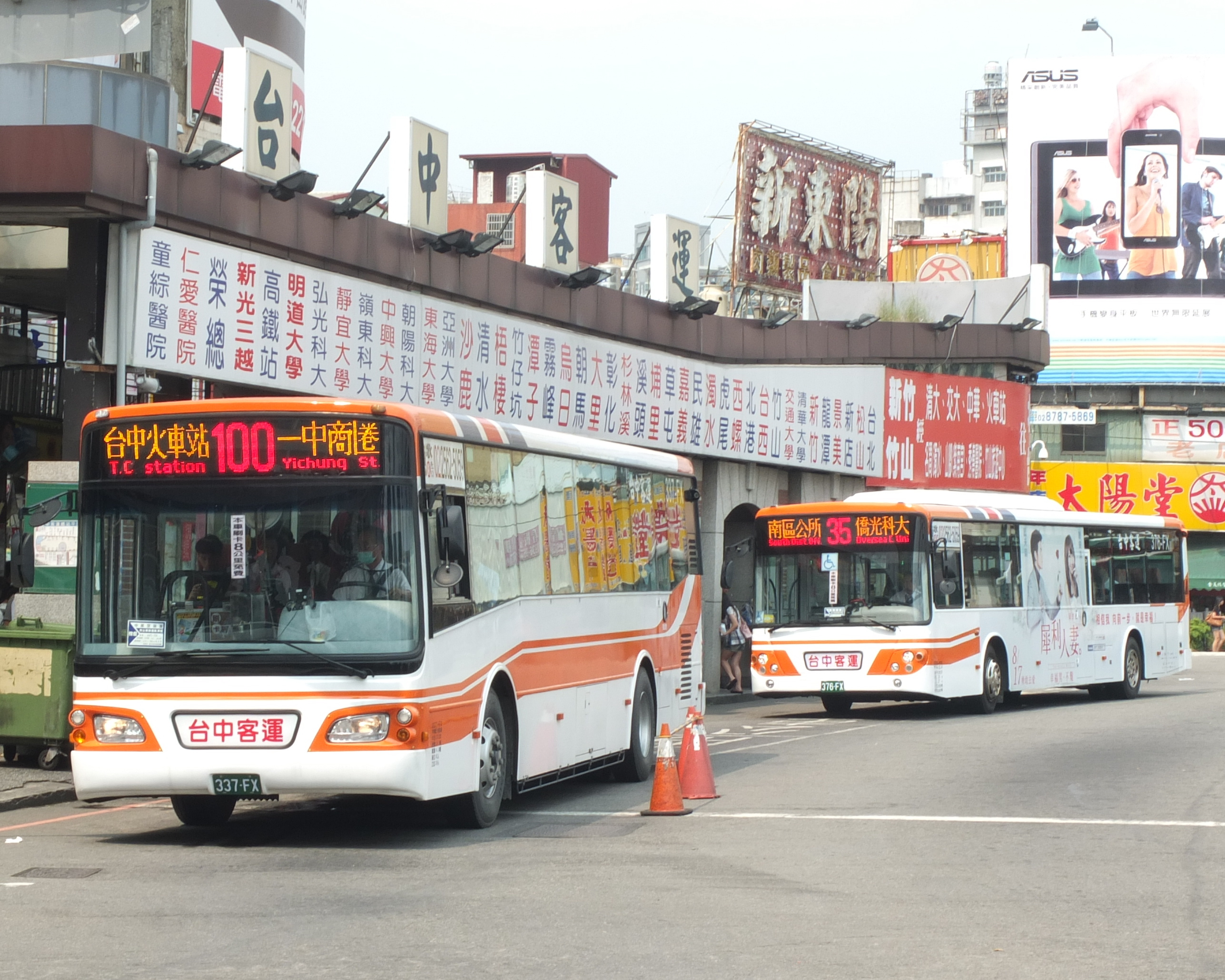 台中客運台中車站，此時行駛100路之337-FX與行駛35路之376-FX靠站，兩者均為台中客運2012年引進之新車種。拍攝於2012年9月。